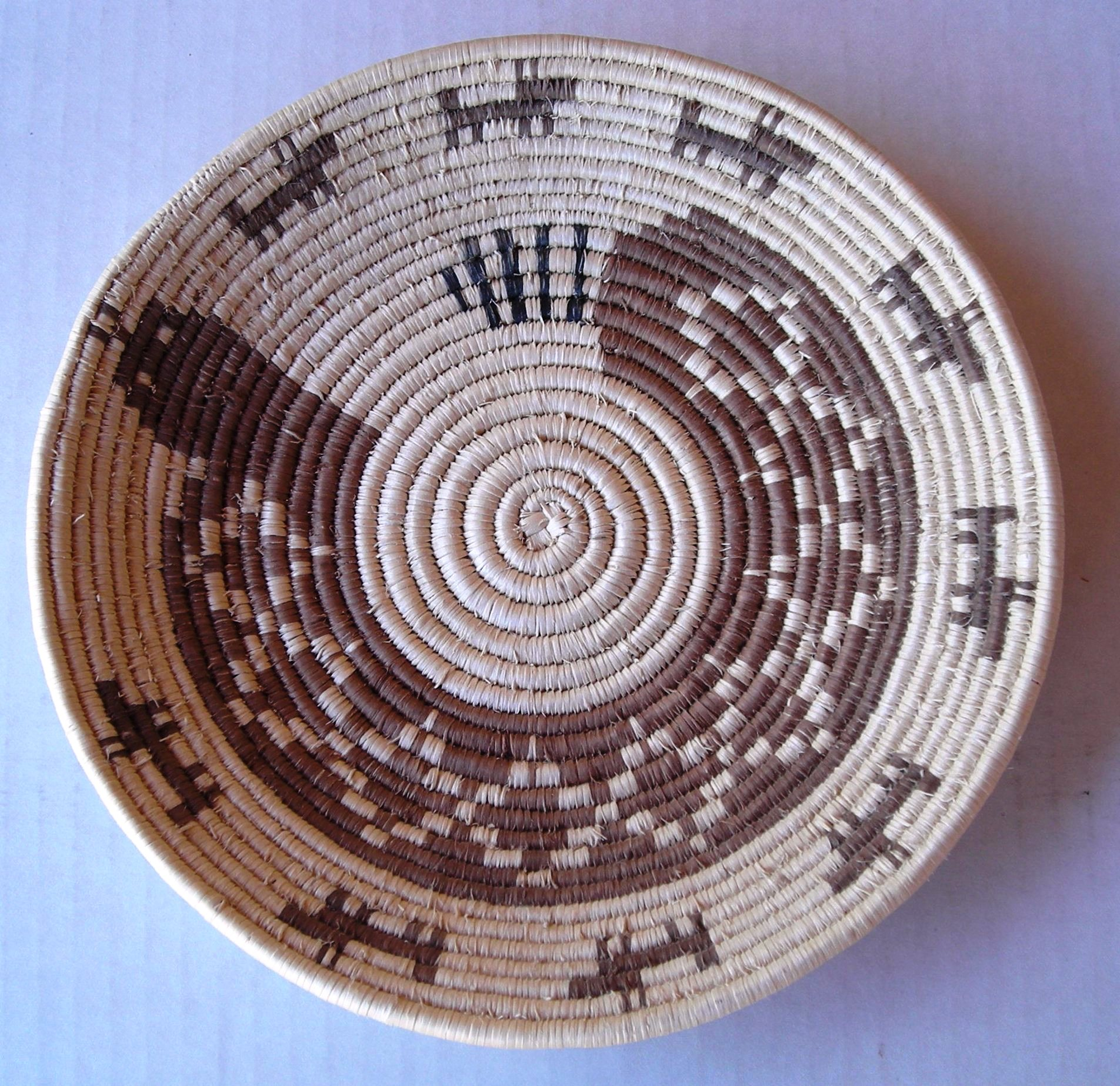 Seri basket corita/hasaj style